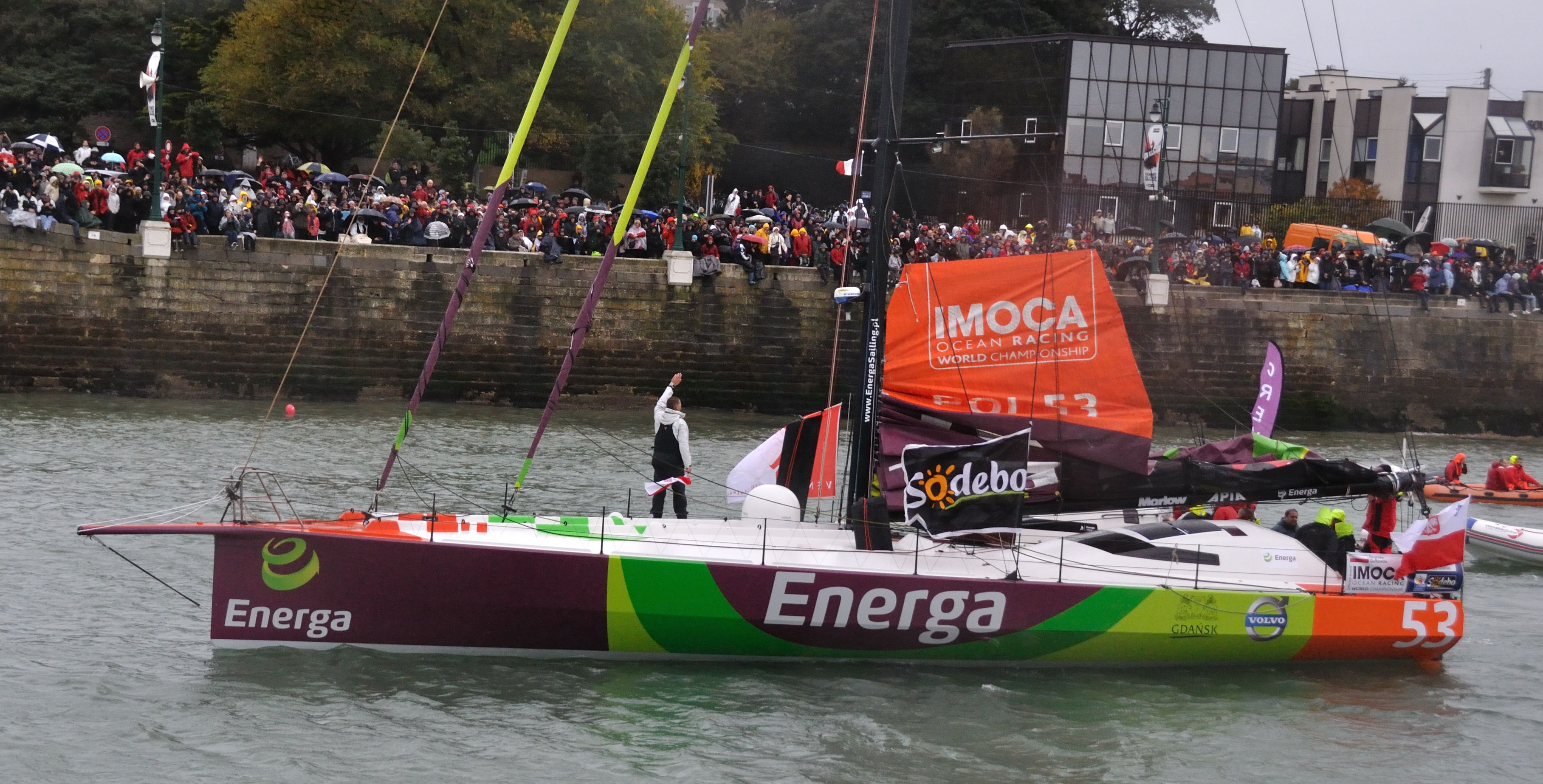 Vendée Globe 2012-2013 : Zbigniew Gutkowski sur Energa au départ des Sables d'Olonne